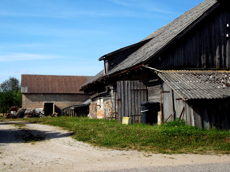 Viljetes muiža